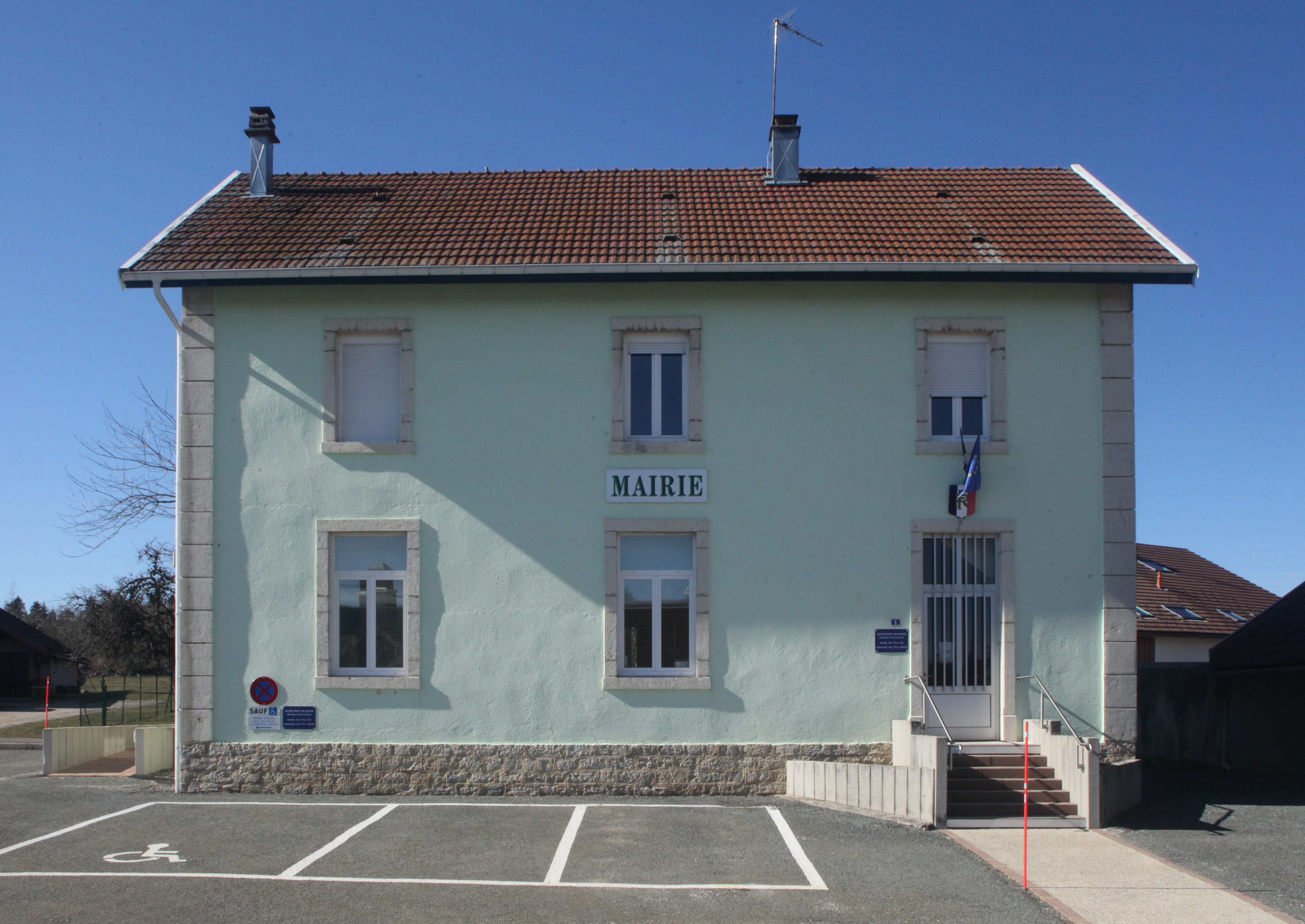 Mairie de Mont-de-Vougney.